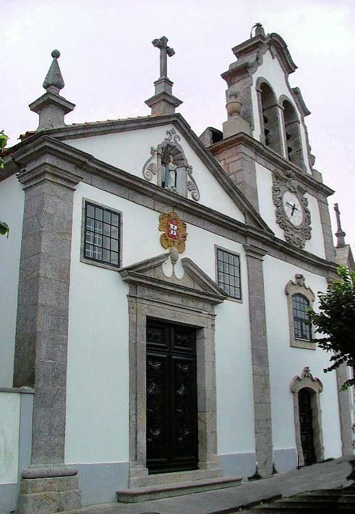 Igreja da Misericórdia de Fão, Património construído de Fão, caráter religioso